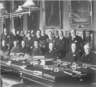 Germán Bernácer Tormo, Consejo BE